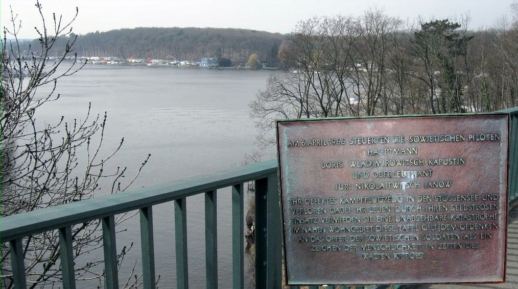 Озеро Штессензее